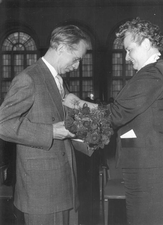 Berlin, Verleihung Goethepreis an Otto Nagel Zentralbild Ulmer 28.8.1957 Zimentkowski Goethepreis der Stadt Berlin verliehen Am 28.8.1957 wurde im Sitzungssaal des Abgeordnetenkabinetts des Rathauses Berlin an drei verdiente Bürger der Stadt Berlin der Goethepreis 1957 verliehen. Sie erhielten aus der Hand des Amtierenden Oberbürgermeisters Waldemar Schmidt die hohe Auszeichnung. UBz: Frau Stadtrat Johanna Blecha steckt Prof. Nagel die Medaille an. Abgebildete Personen: Nagel, Otto Prof.: Maler, Präsident der Akademie der Künste (AdK), Nationalpreisträger, Vaterländischer Verdienstorden (VVO) in Gold, DDR (GND 118586300)